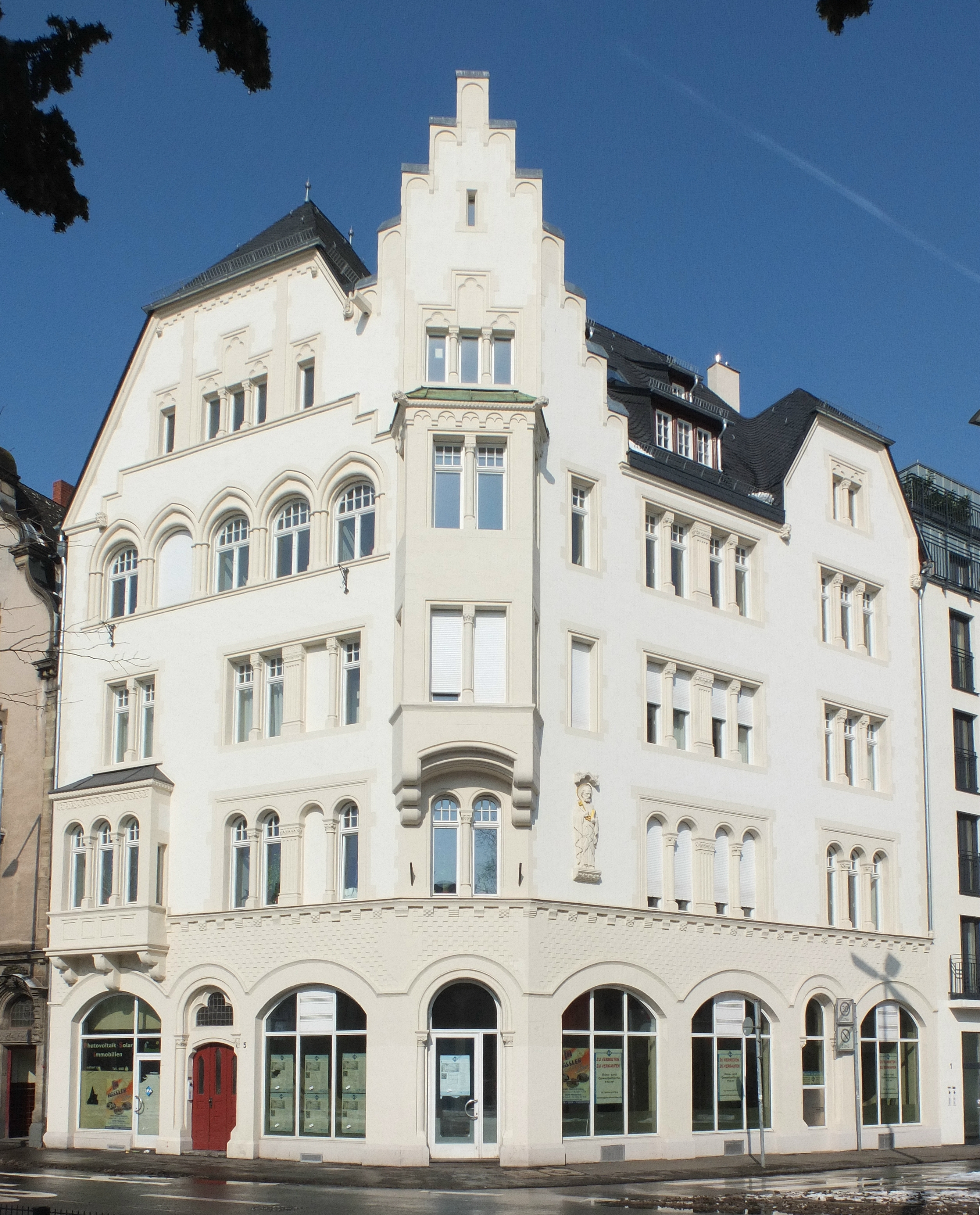 Trier, Porta-Nigra-Platz 5, viergeschossiges Wohn- und Geschäftshaus, historisierender Putzbau, bezeichnet 1905, Architekten Julius Wirtz und Wilhelm Schmitz (Ansicht Süd)